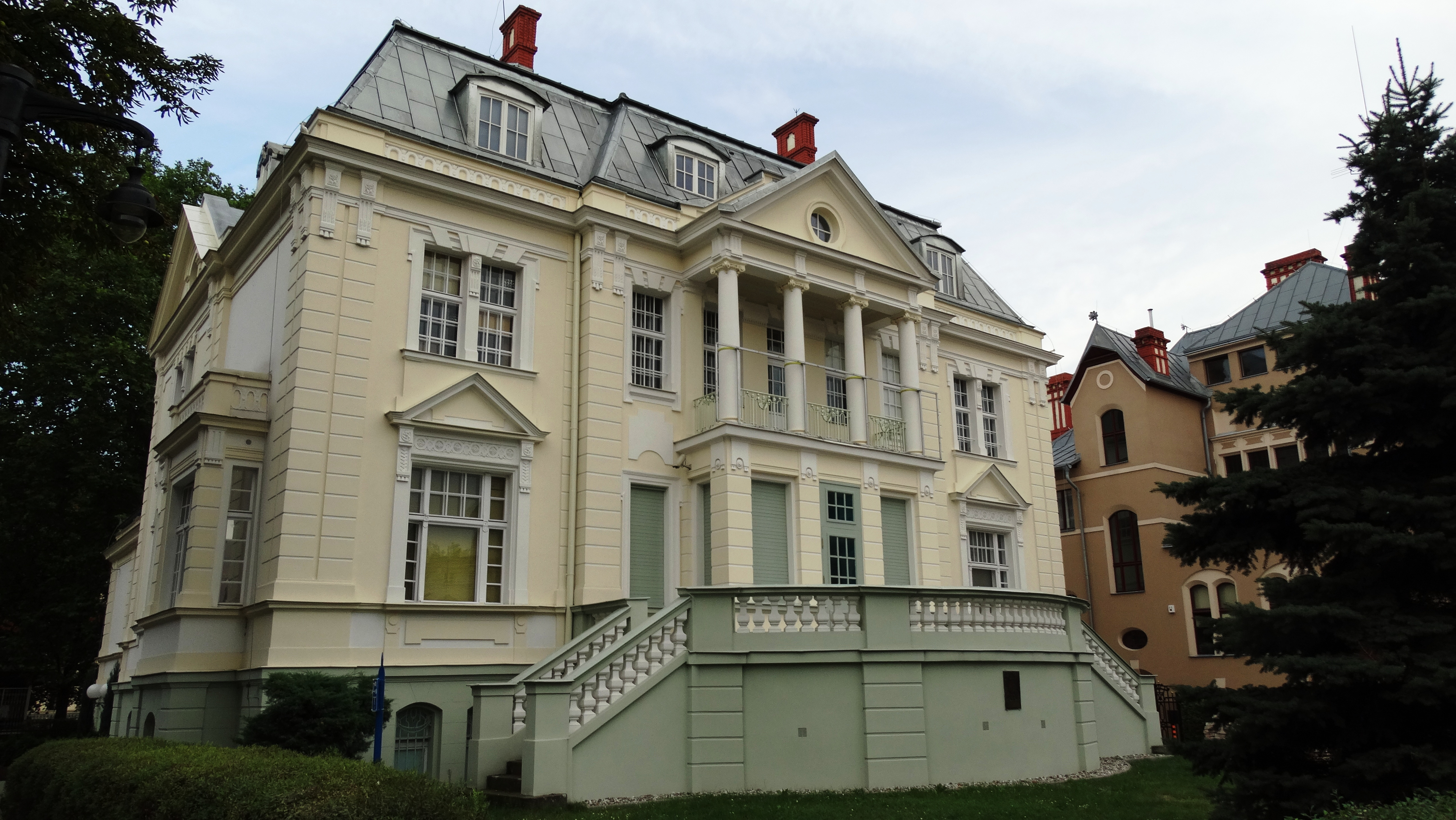 Bydgoszcz, willa, 1904